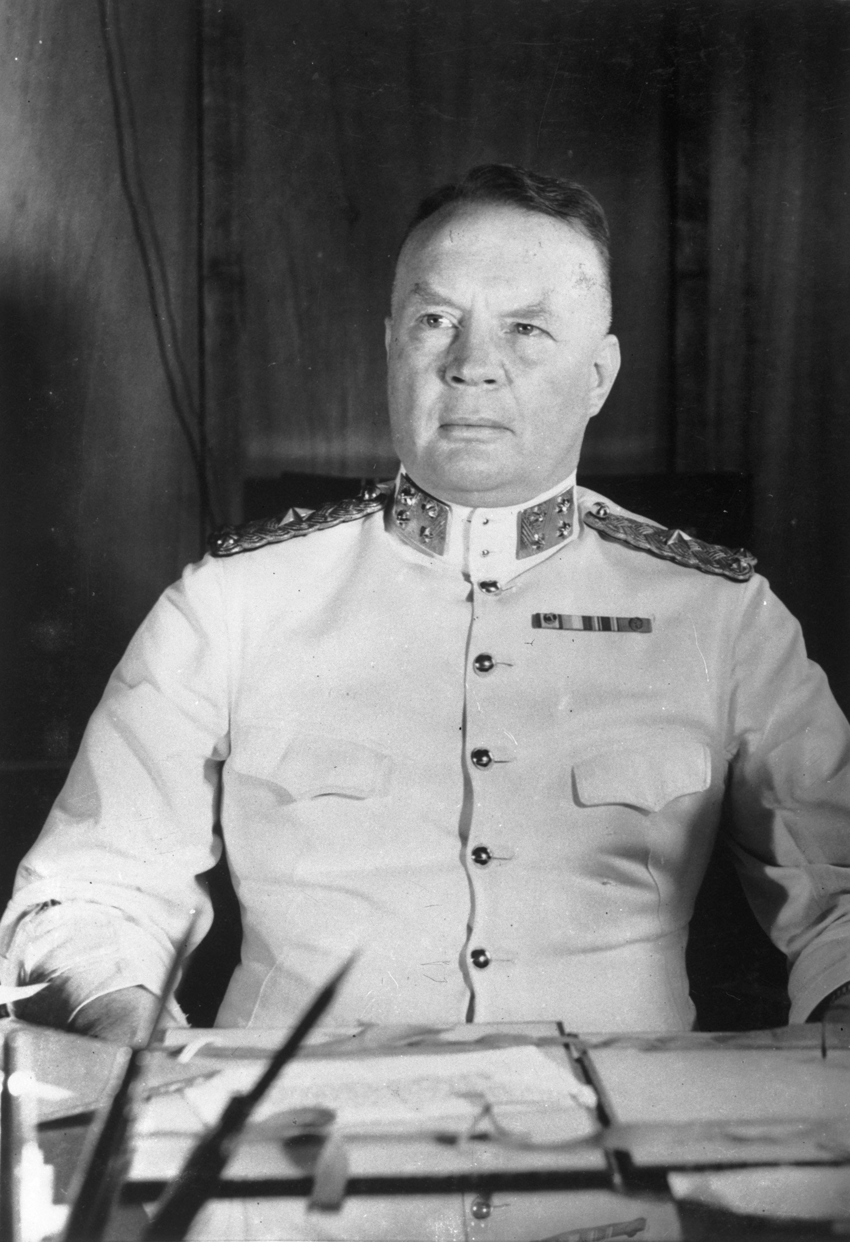 Collectie / Archief : Fotocollectie Anefo / Londen Reportage / Serie : P [Portraits/Persons] / Anefo Londen serie Beschrijving : Generaal-Majoor H. ter Poorten, Commandant KNIL Annotatie : Repronegatief Datum : 1941 Locatie : Indonesië, Nederlands-Indië Trefwoorden : KNIL, officieren, portretten, portretten, tweede wereldoorlog Persoonsnaam : Poorten, H. ter Fotograaf : Onbekend / Publiek Domein Auteursrechthebbende : Nationaal Archief Materiaalsoort : Negatief (zwart/wit) Nummer archiefinventaris : bekijk toegang 2.24.01.04 Bestanddeelnummer : 935-0782